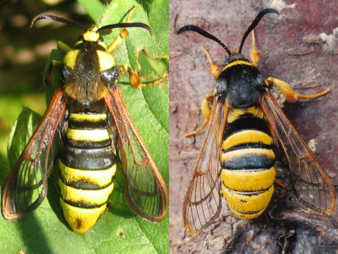 Side by side comparison; On the left side a Hornet Moth (Sesia apiformis) and on the right a Lunar Hornet Moth (Sesia bembeciformis). Note the difference in shoulder colouring to distinguish between the species. Images are not to the same scale. Keywords: mimicry --- nl: Vergelijkende collage met links een Hoornaarsvlinder (Sesia apiformis) en rechts een Gekraagde wespvlinder (Sesia bembeciformis). Let op de verschillend gekleurde schouderpartijen om de soorten te onderscheiden. Afbeeldingen links/rechts zijn niet op dezelfde schaal. de: Vergleich mit links einen Hornissen-Glasflügler (Sesia apiformis) und rechts einen Großer Weiden-Glasflügler (Sesia bembeciformis). Die verschieden gefärbte Schultern unterscheidet die Arten. Teilbilder sind nicht gleich skaliert.